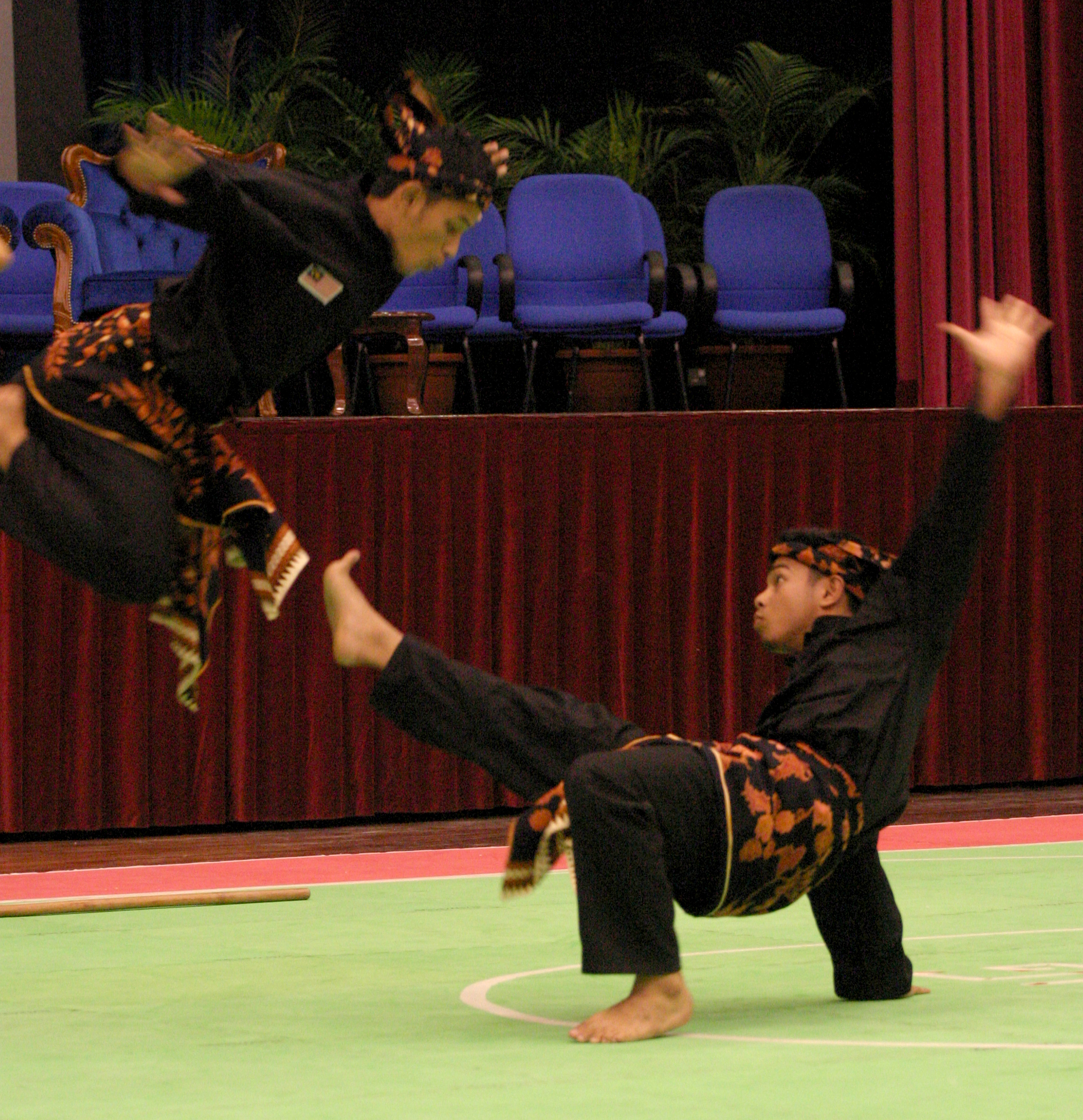 На соревнованиях по силату во время Универсиады стран АСЕАН (Университет Малайя, Куала-Лумпур, апрель 2010)